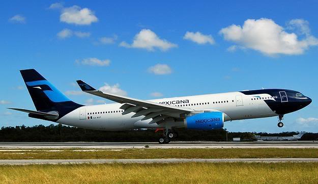 avion de mexicana despegando de aeropuerto de cancun